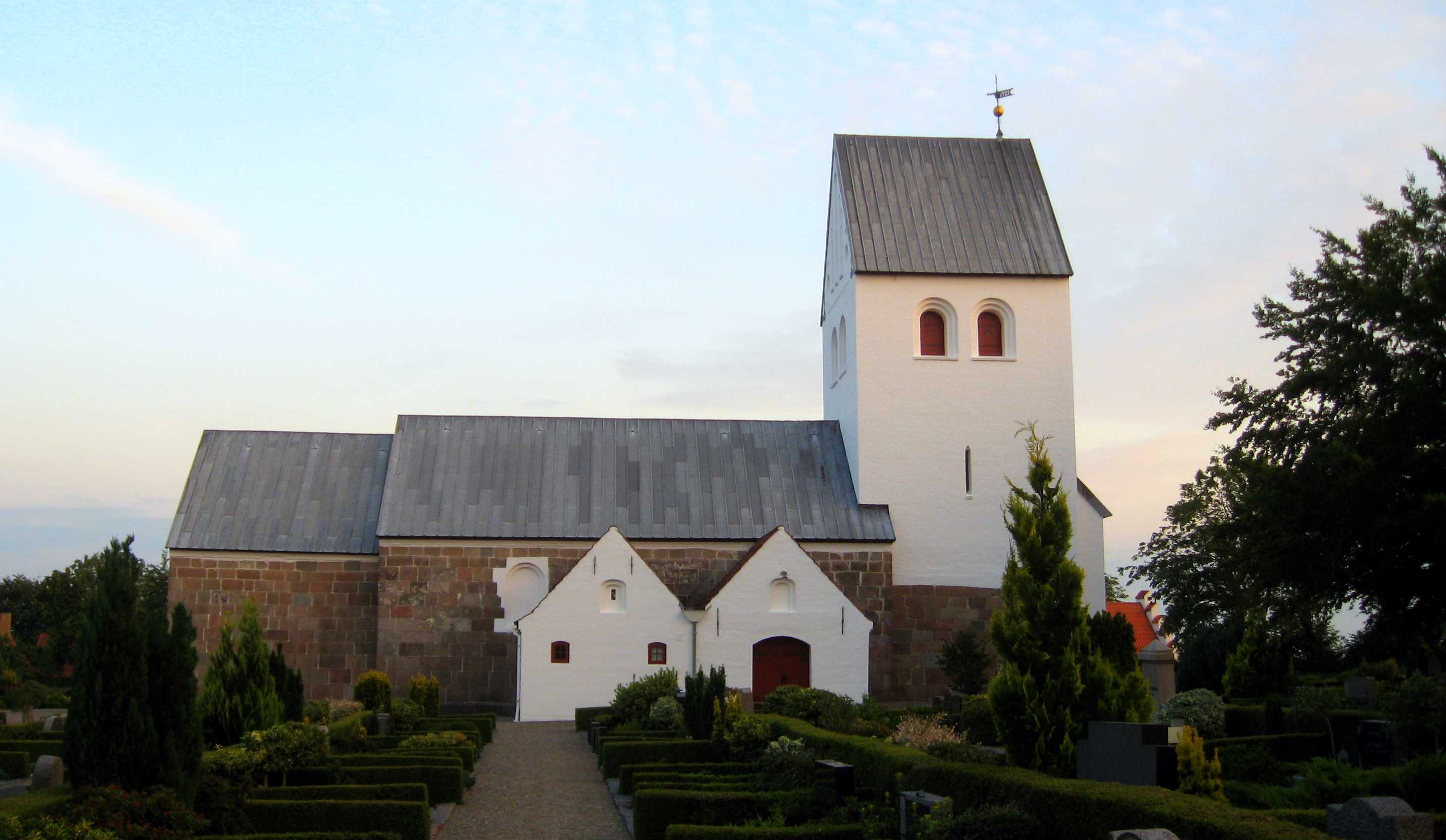 Biersted Kirke, Jammerbugt Kommune